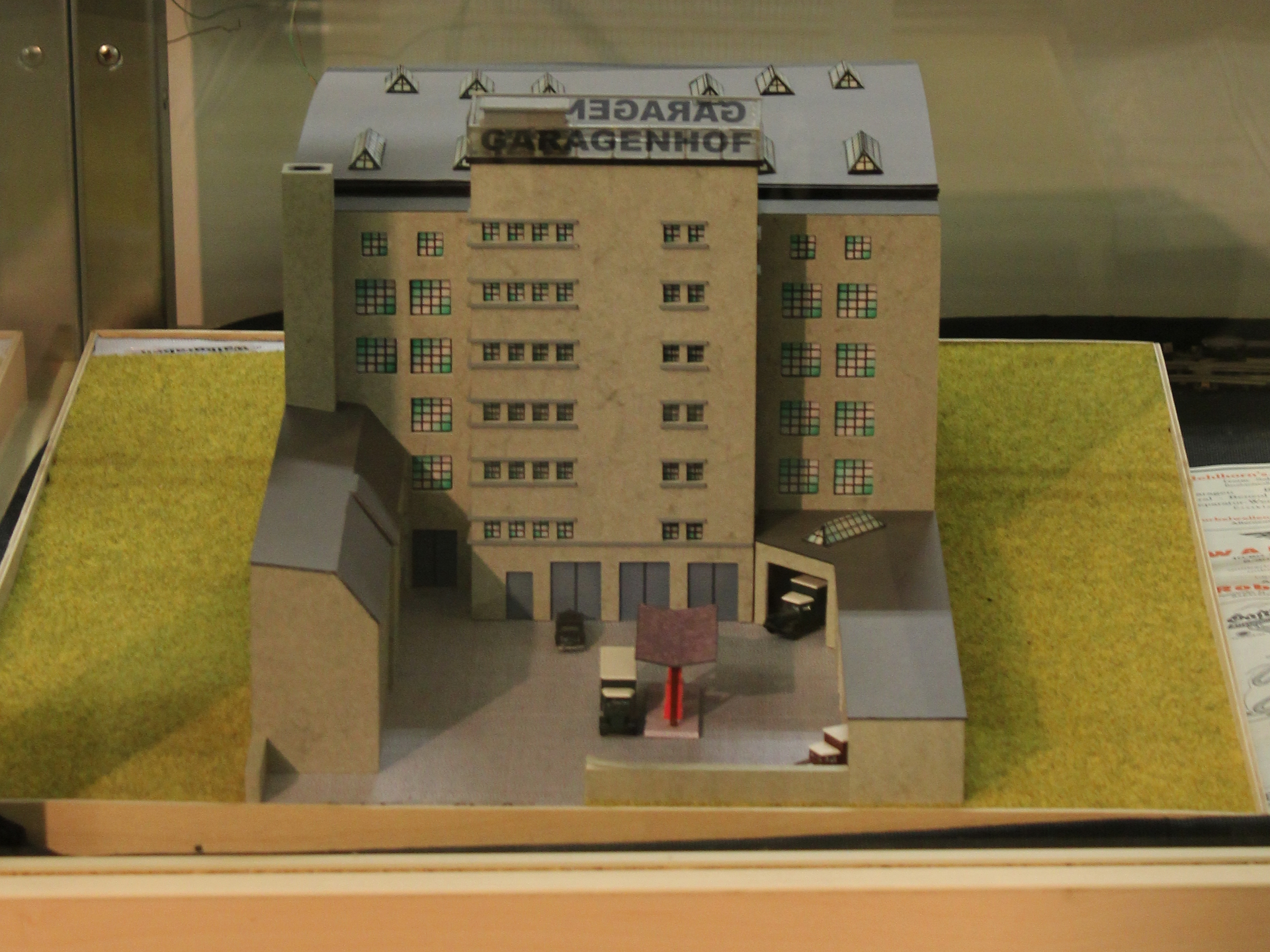 Modell des Garagenhofs in Chemnitz. Exponat des Museums für sächsische Fahrzeuge